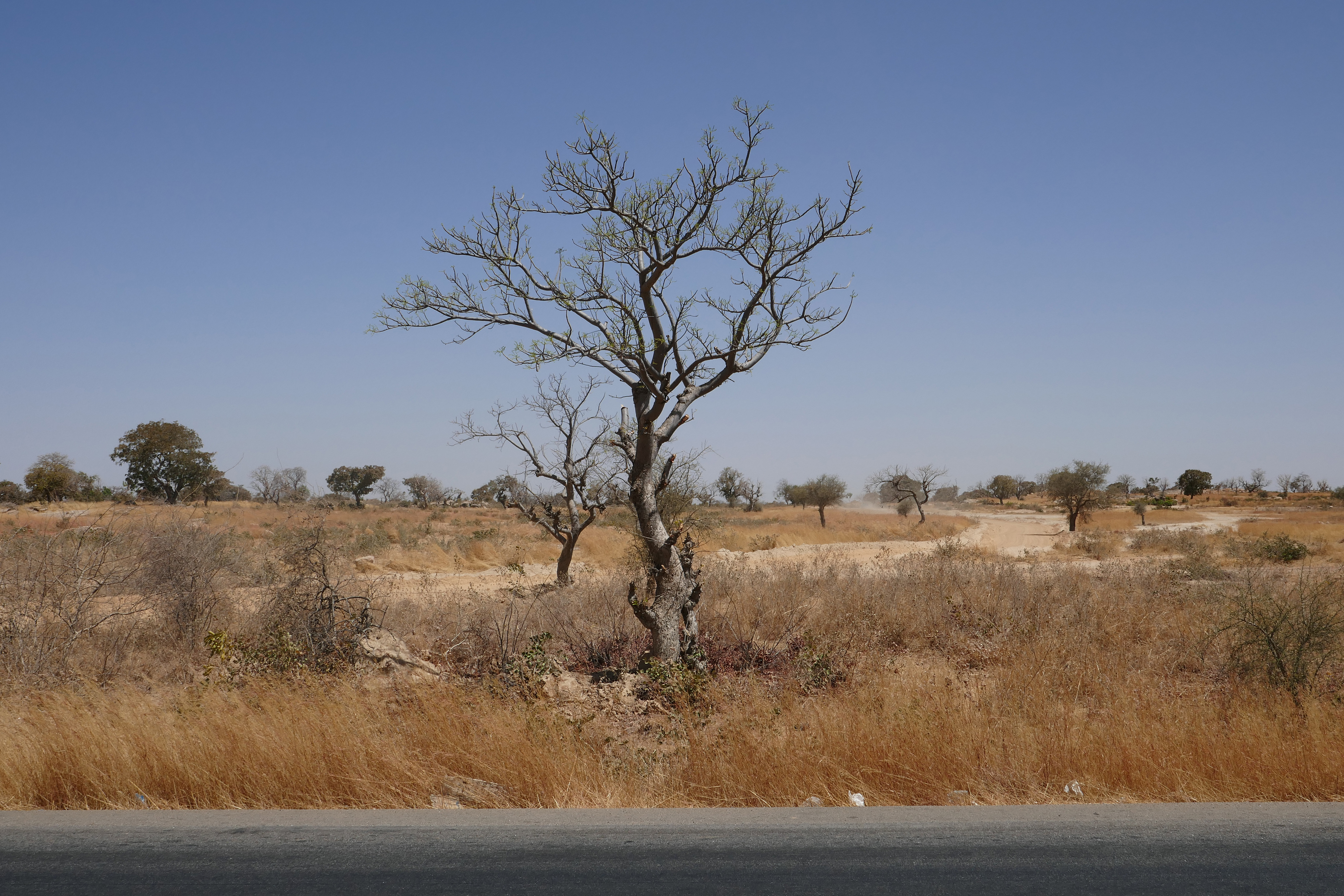 Paysage près de Zorgho (Burkina Faso).